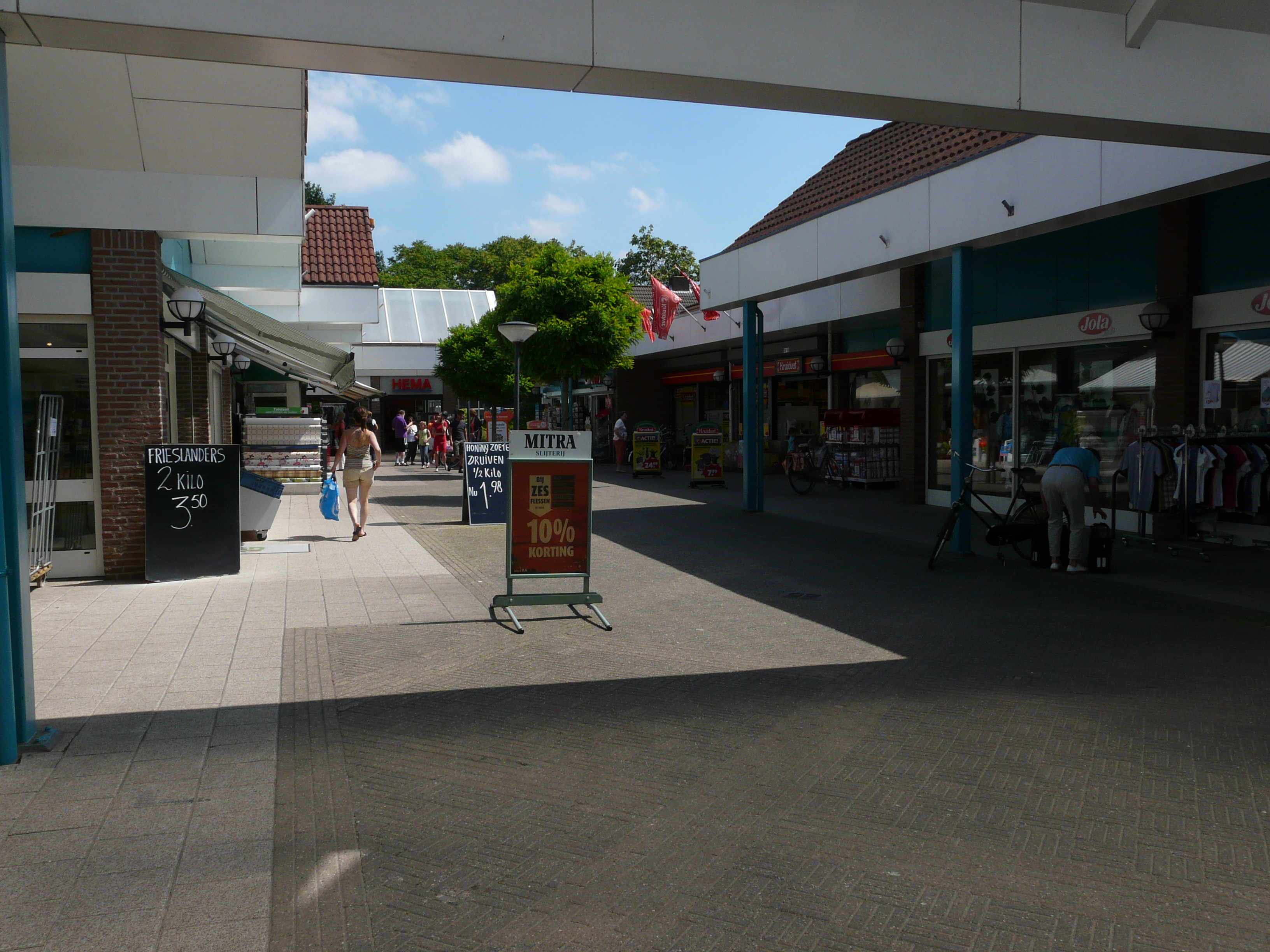 Winkelcentrum Eikenbosch in Berkel-Enschot